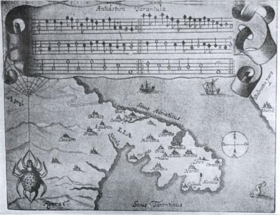 "Tarantella", Musikstück zu Heilung der angeblich von Taranteln gebissenen "Tarantolati". Der "Tarantismus" kommt auch heute noch in Apulien vor. Kupferstich aus einem Buch von Samuel Hafenreffer (1587-1660).